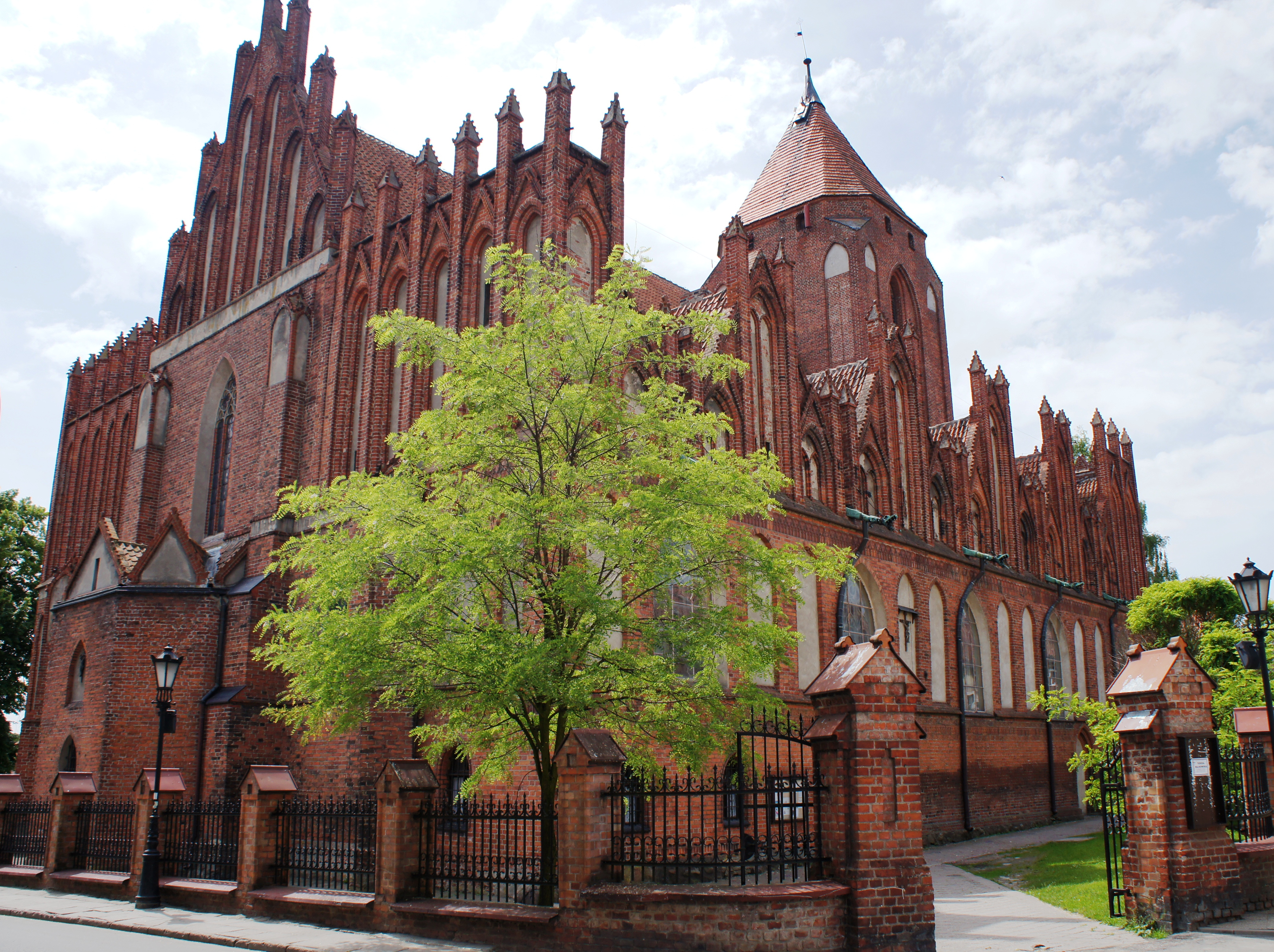 Orneta - kościół parafialny pw. św. Jana Chrzciciela (zabytek nr A-185)